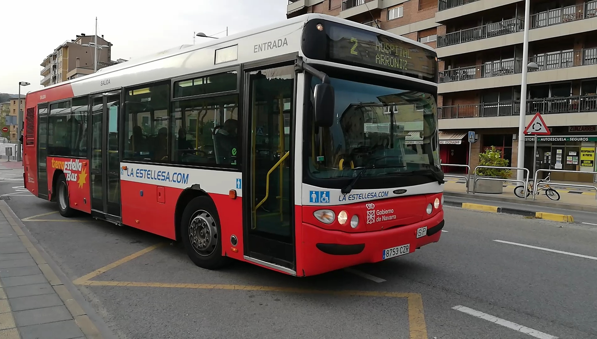 L2 del Tierra Estella Bus, cubriendo el recorrido entre el Hospital García Orcoyen y el pueblo de Arróniz, a su paso por la Estación de Autobuses de Estella